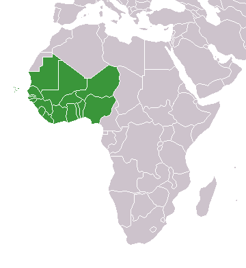 Karte Mitgliedstaaten der West African Football Union